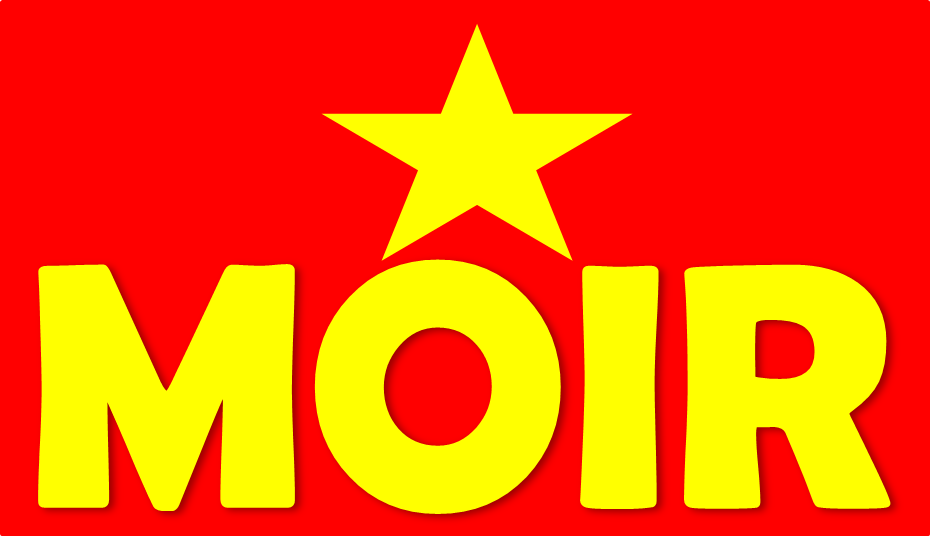 Movimiento politico MOIR